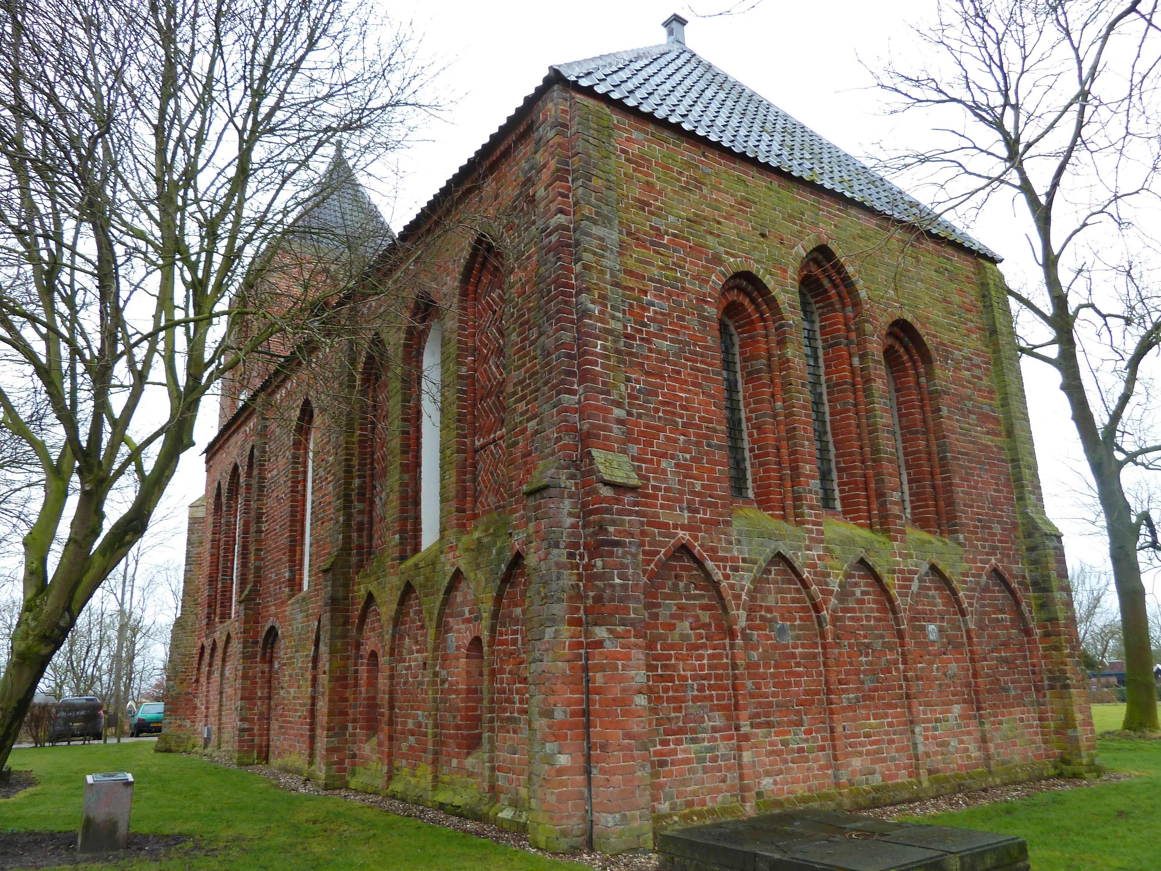 Mariakerk schuin van achteren.